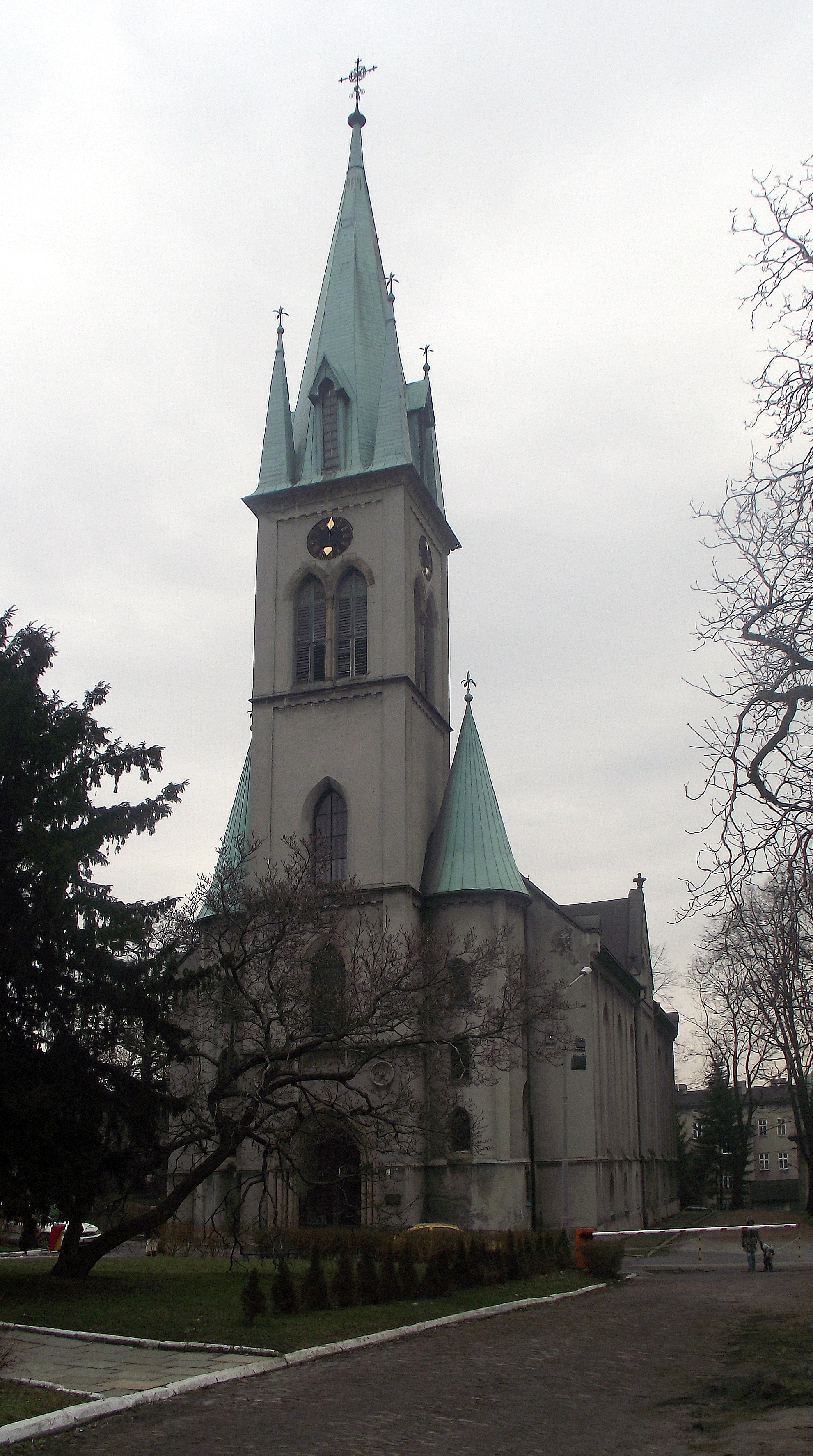 Katedra ewangelicka pw. Zbawiciela w Bielsku-Białej